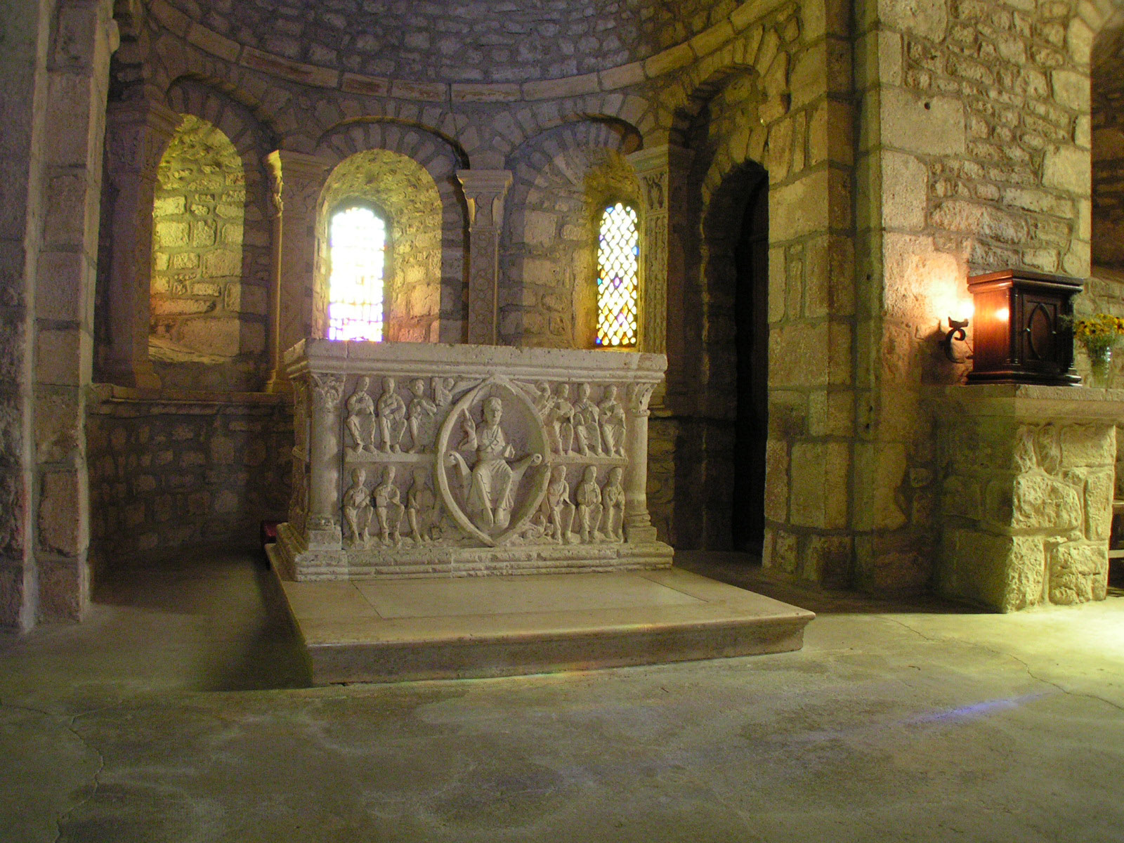 Eglise de Notre-Dame-d’Avenas (architecture romane XIIe): l'autel sculpté dans le calcaire